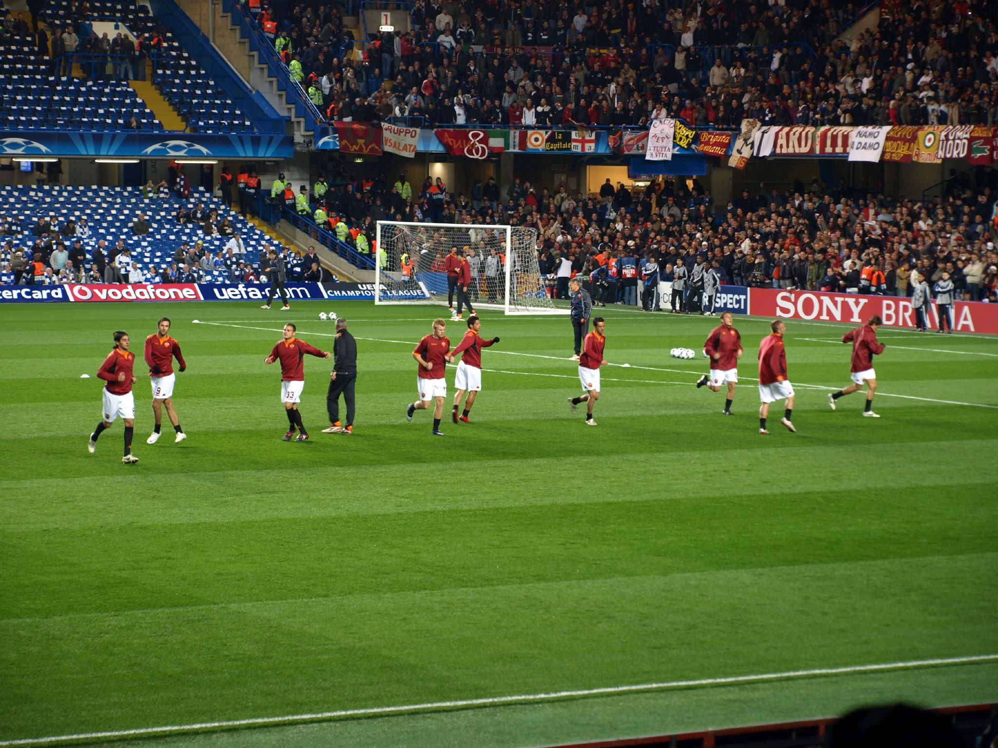 Chelsea-Roma, Champions League. La Roma in campo per il riscaldamento.